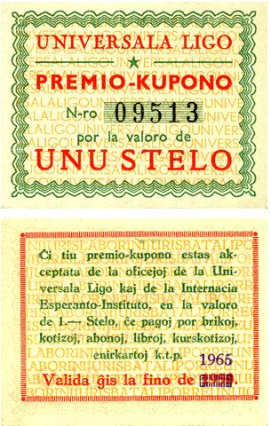 Stelokupono